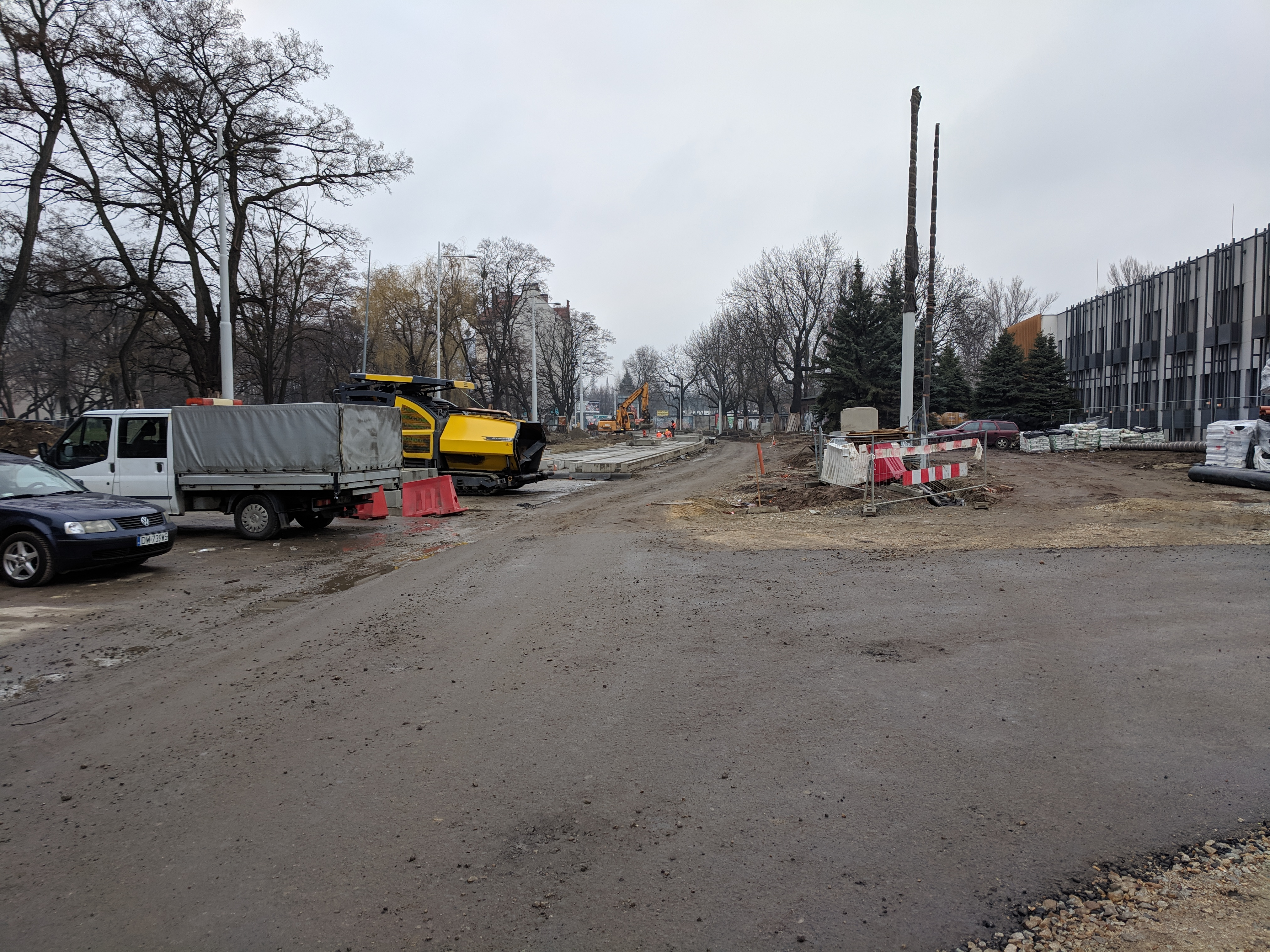 remont ulicy Hubskiej we Wrocławiu